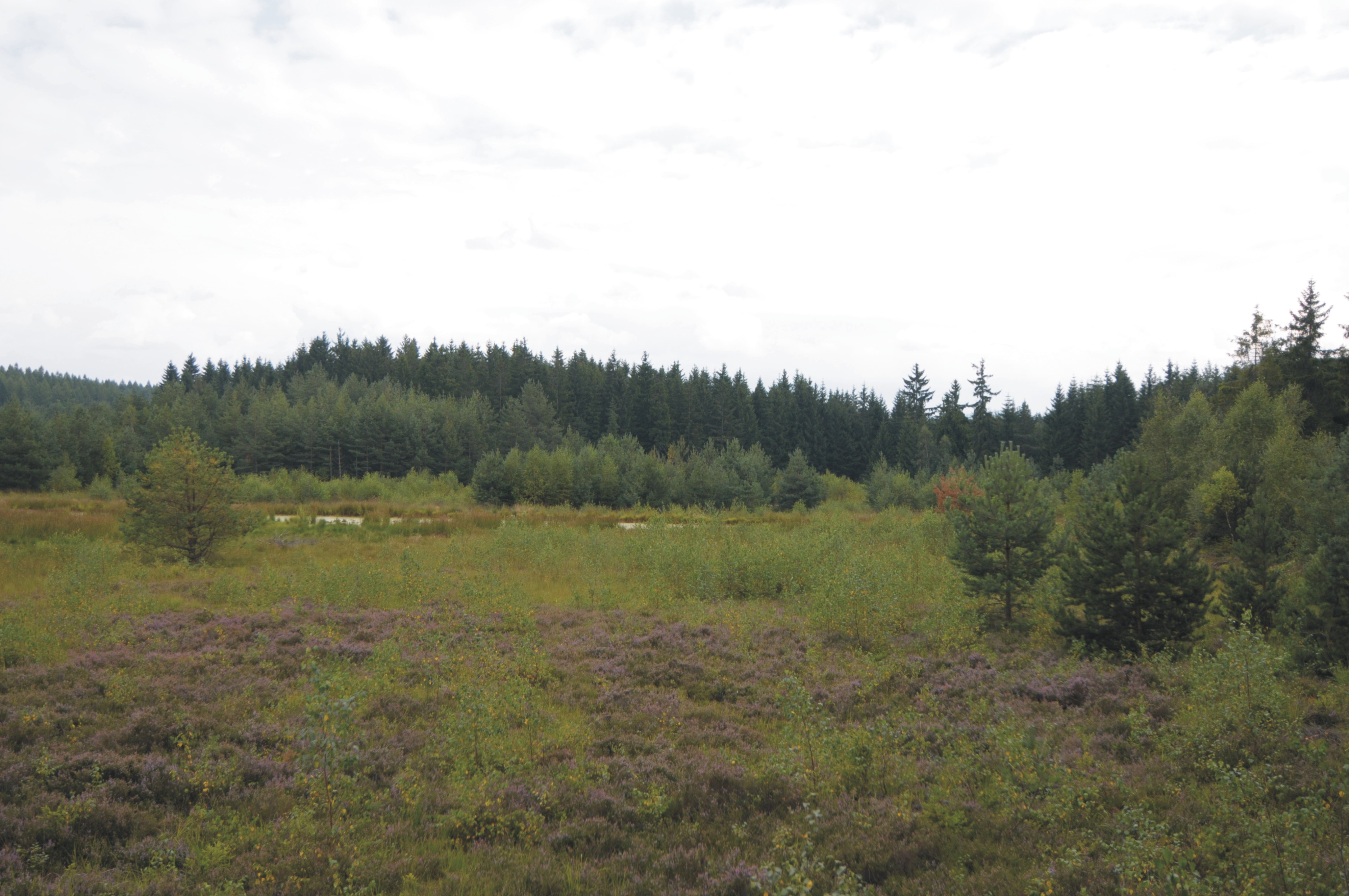 Bereich der früheren Torfgewinnung im ehemaligen Hochmoor Jahnsgrün im Hartmannsdorfer Forst bei Kirchberg (Sachsen, Deutschland)